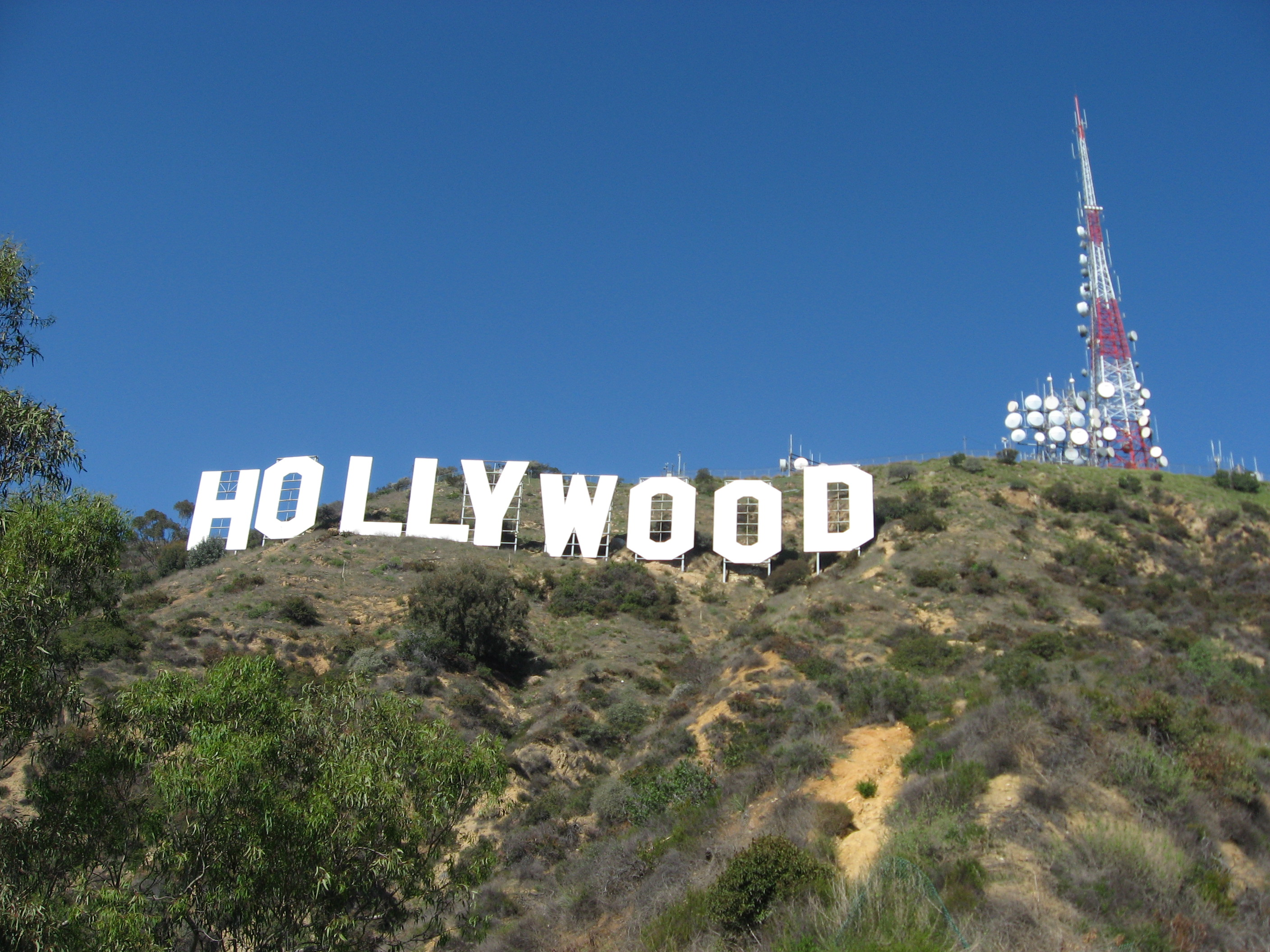 Hollywood Sign